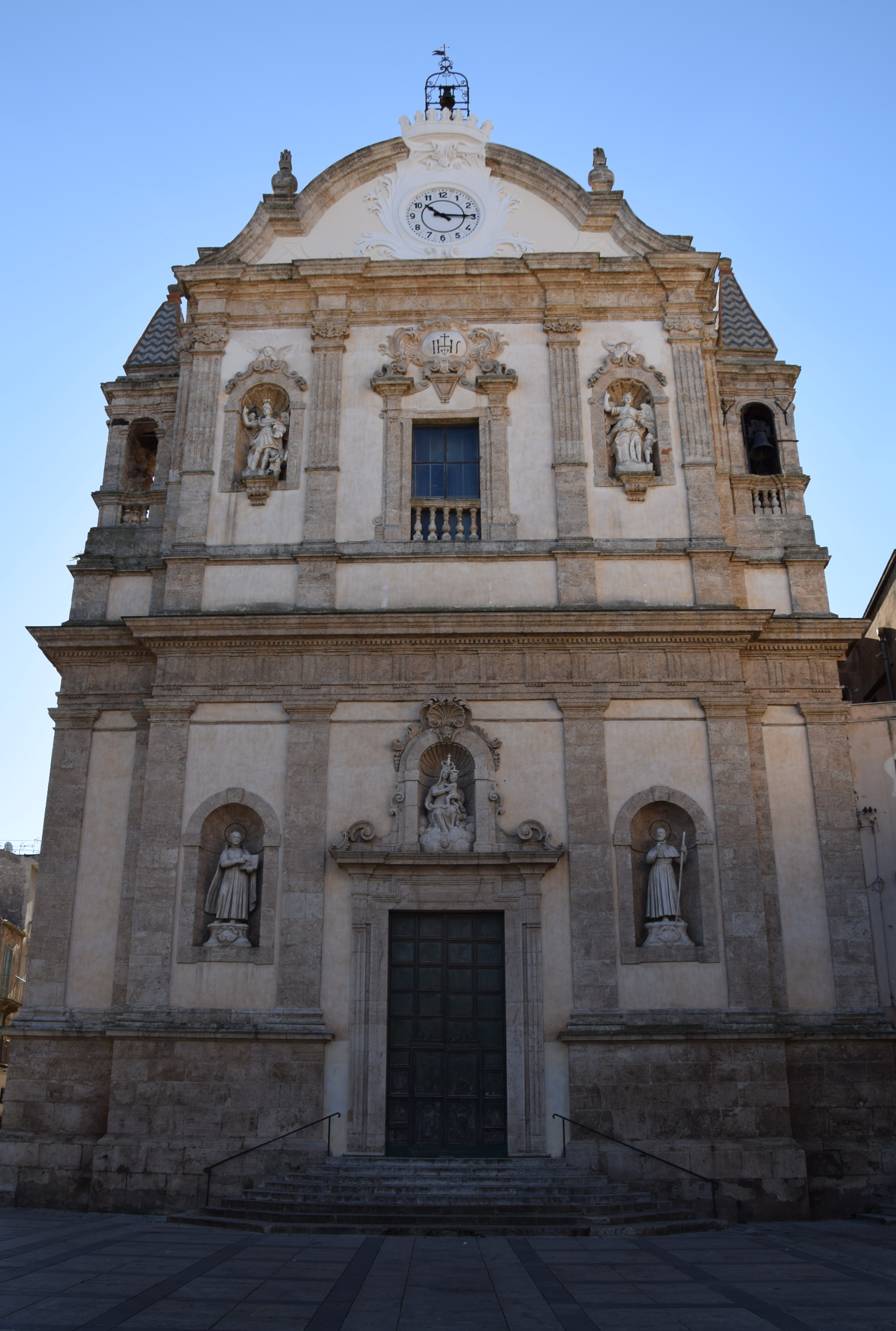 Chiesa del Collegio dei Gesuiti (Alcamo)